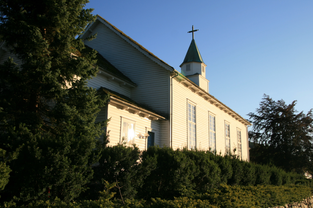 Ølen kirke